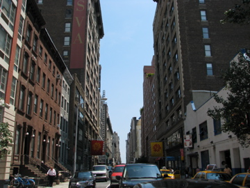 SVA_WestSideBuilding